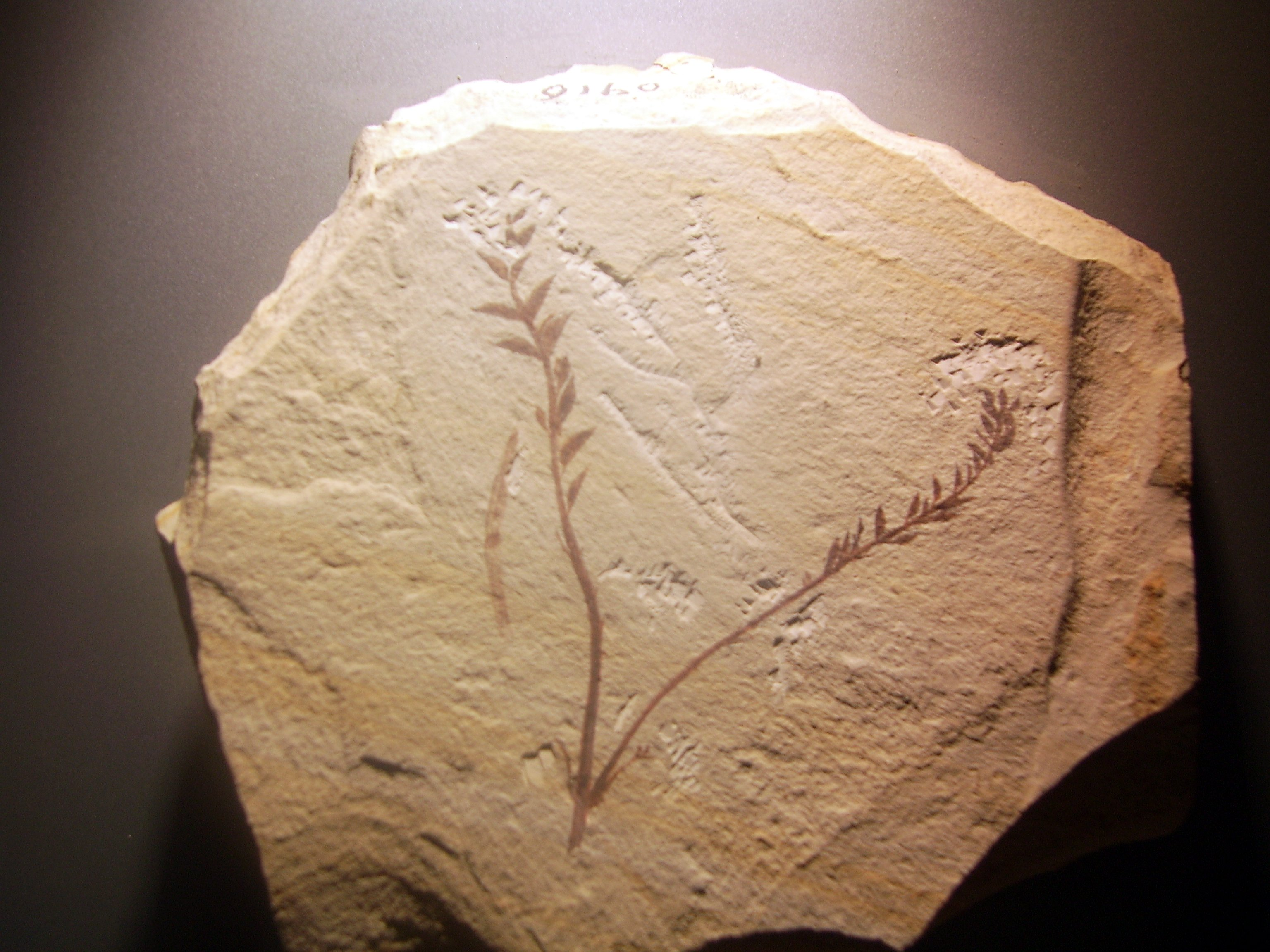 辽宁古果（Archaefructus liaoningensis），为迄今发现的最早的花（早白垩纪），于北京自然博物馆